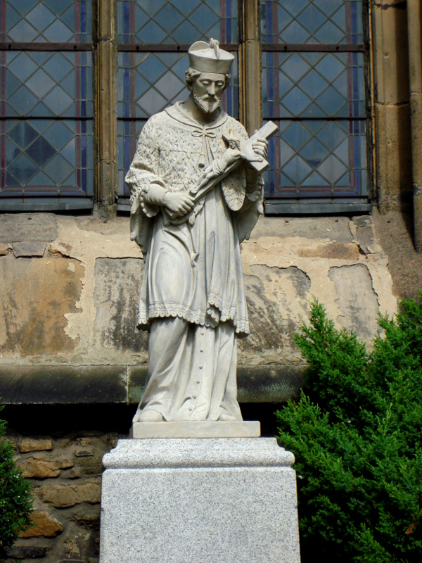 Strzegom, figura św. Jana Nepomucena przed bazyliką Świętych Apostołów Piotra i Pawła